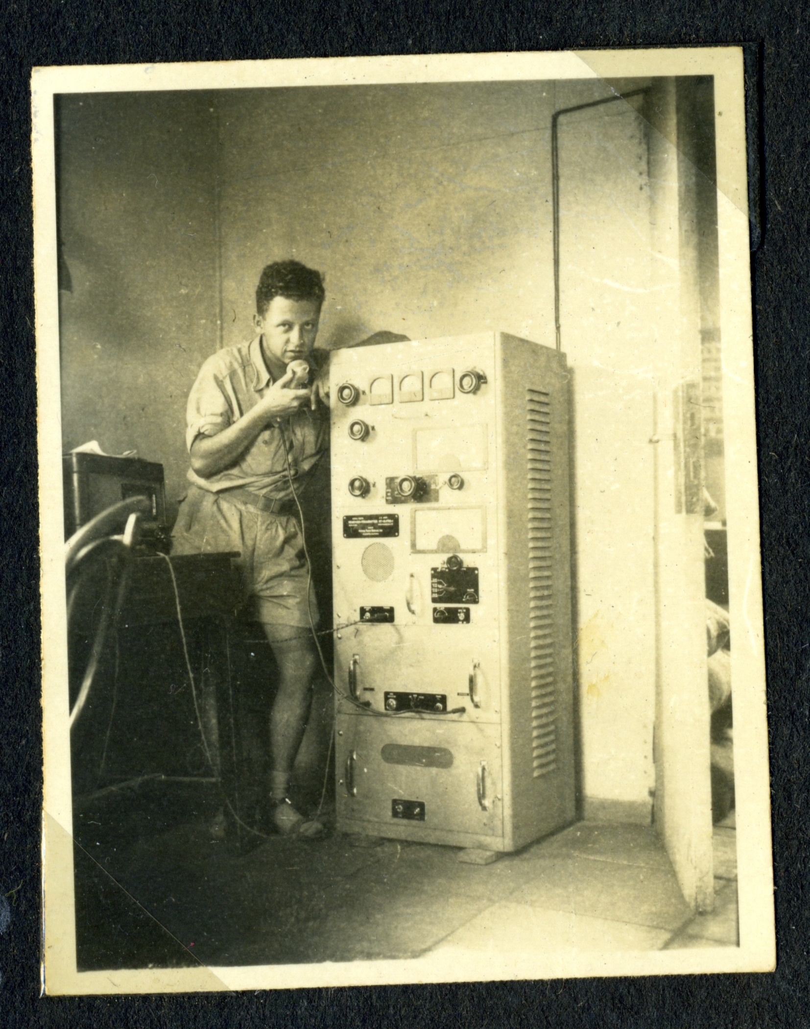 צבי כרמל, מטה חזית הצפון במזרע, 1948